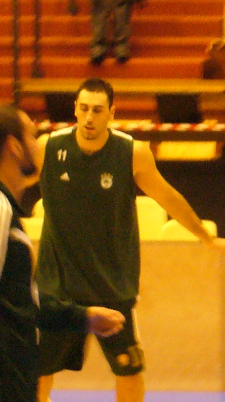 Le joueur grec Dikoudis sous le maillot du Panathinaikos en novembre 2007 (Clermont-Ferrand)